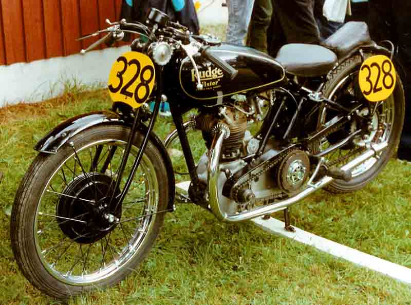 Rudge Ulster Racer